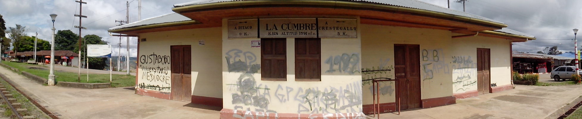 Estación del ferrocarril de La Cumbre - Valle del Cauca